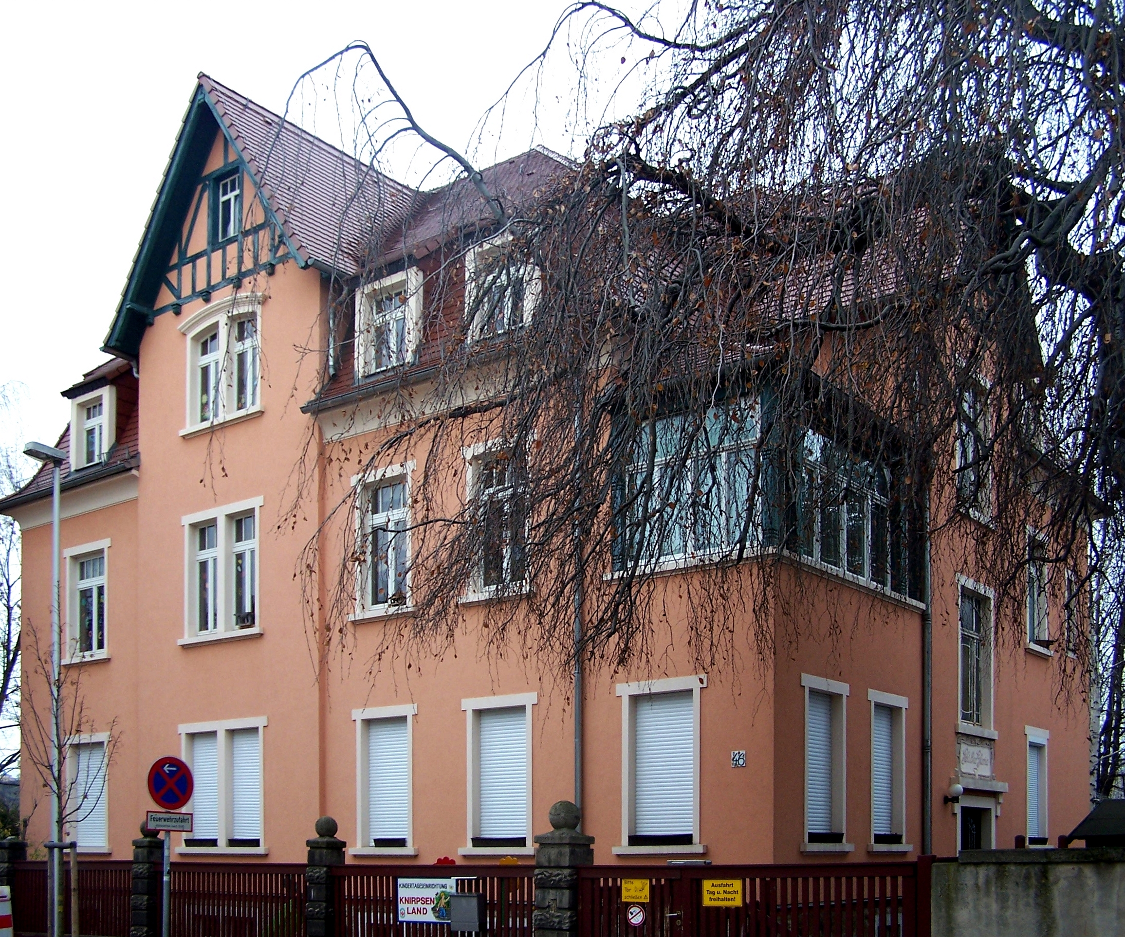 Gartenstr. 46 in Radebeul